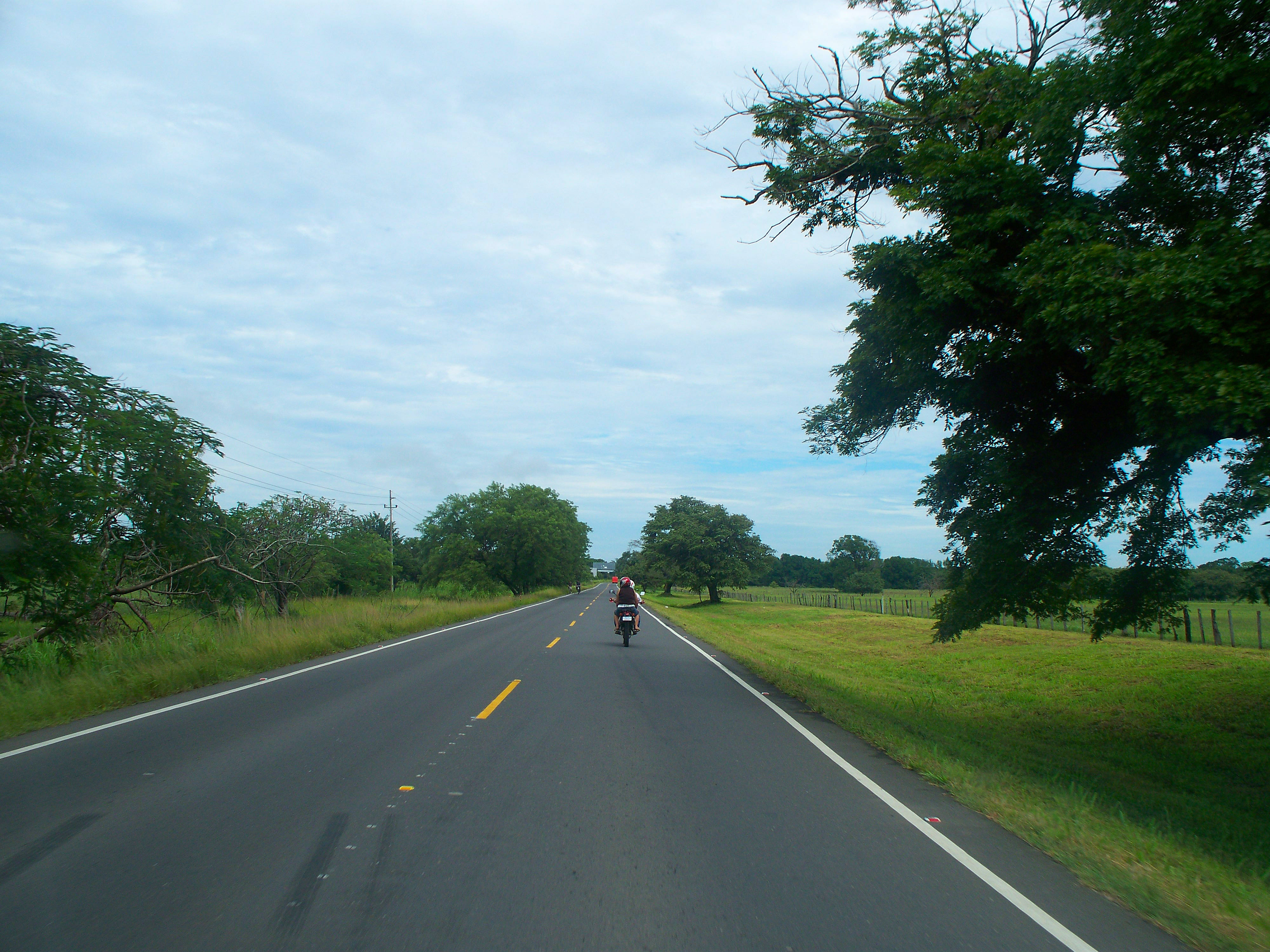 Carretera Panamericana en Guanacaste, Costa Rica